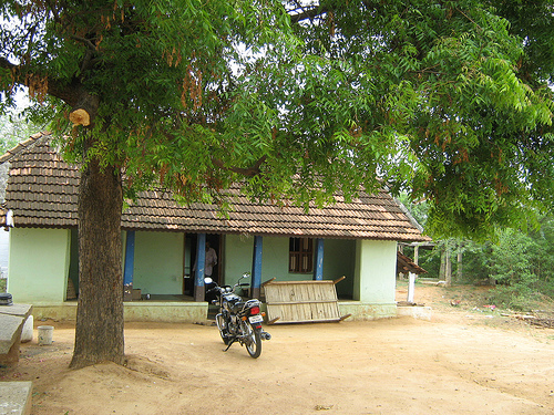 Melur, Tamil Nadu, India.